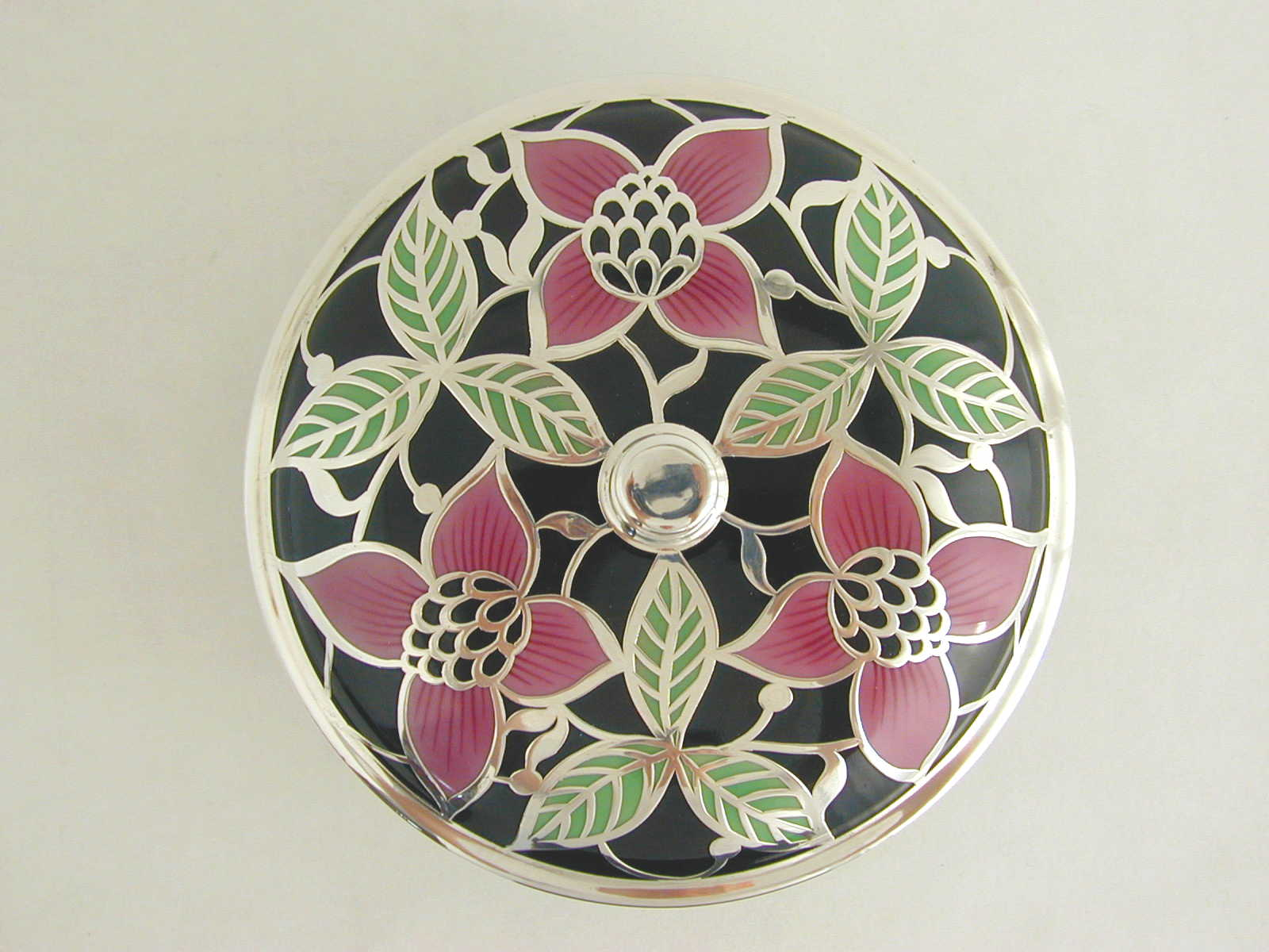 Ein typisches Beispiel für die kunsthandwerkliche Qualität der eigenen Farbglasuren und der dezenten Porzellanbemalung